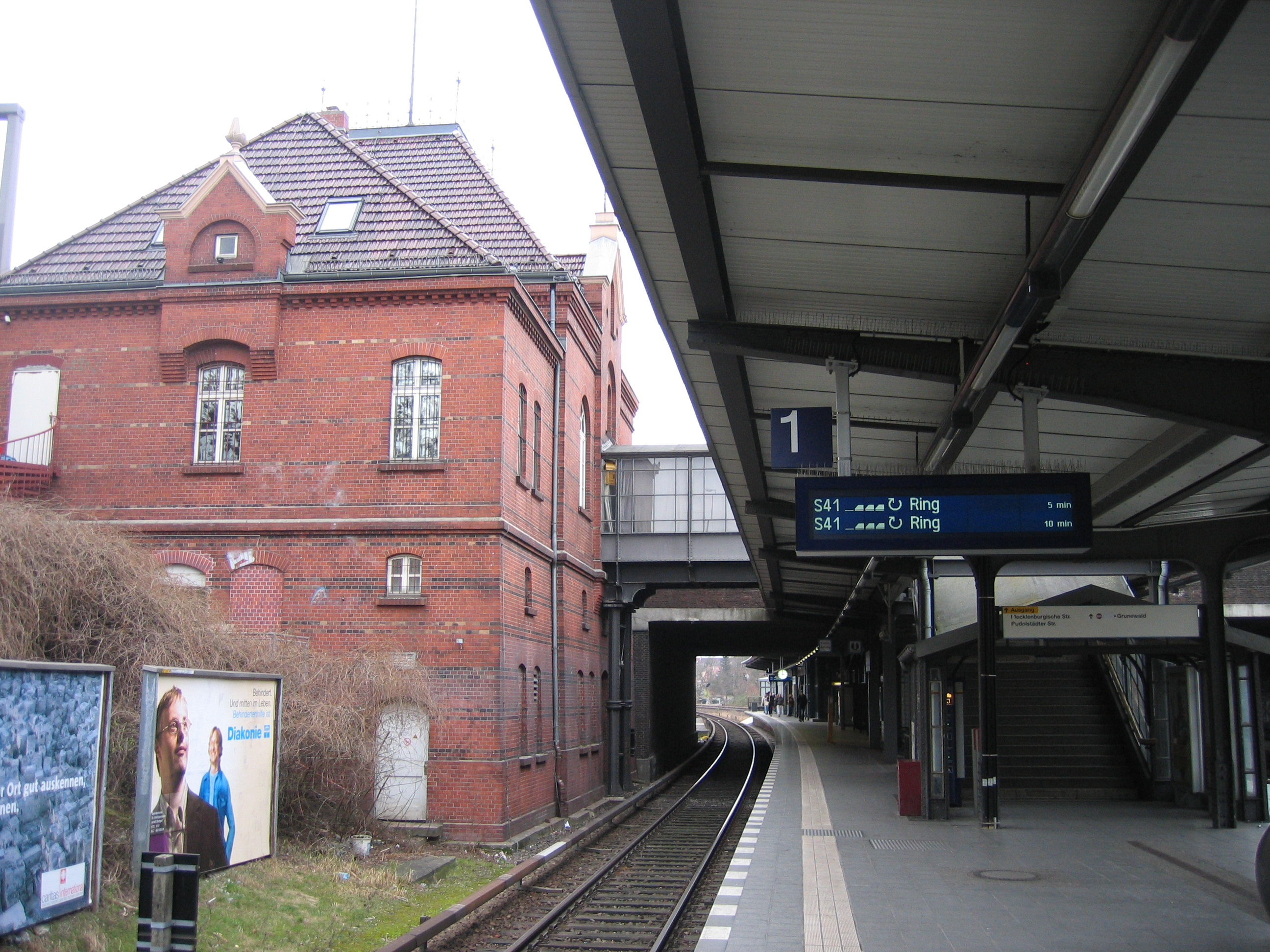 Der S-Bahnhof Heidelberger Platz in Berlin